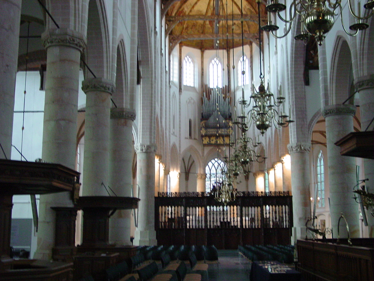 Grote of Sint-Vituskerk in Naarden, Nederland